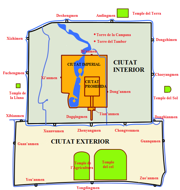 Mapa de la ciutat prohibida